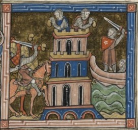 Siège de Péluse 1168